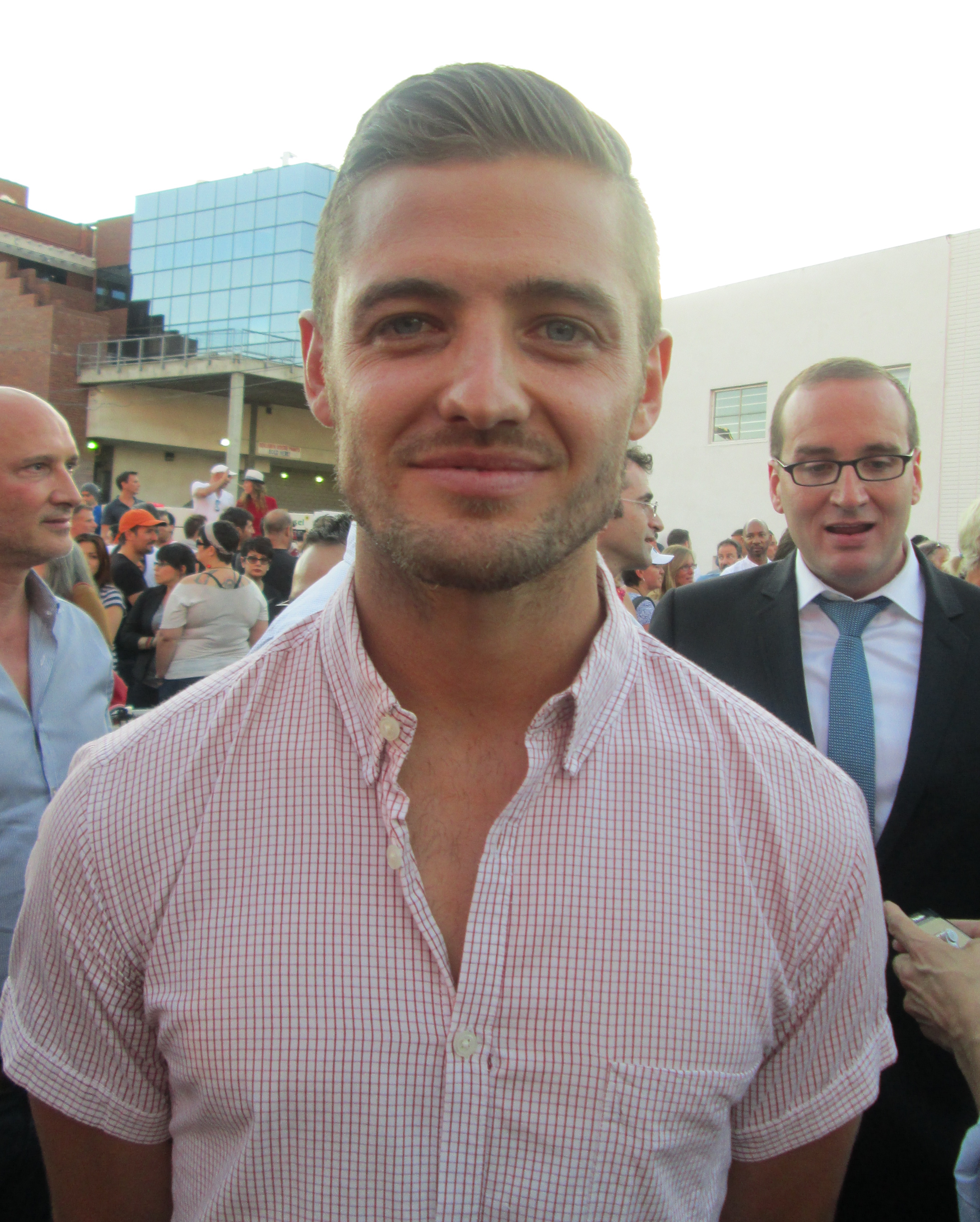 Robbie Rogers